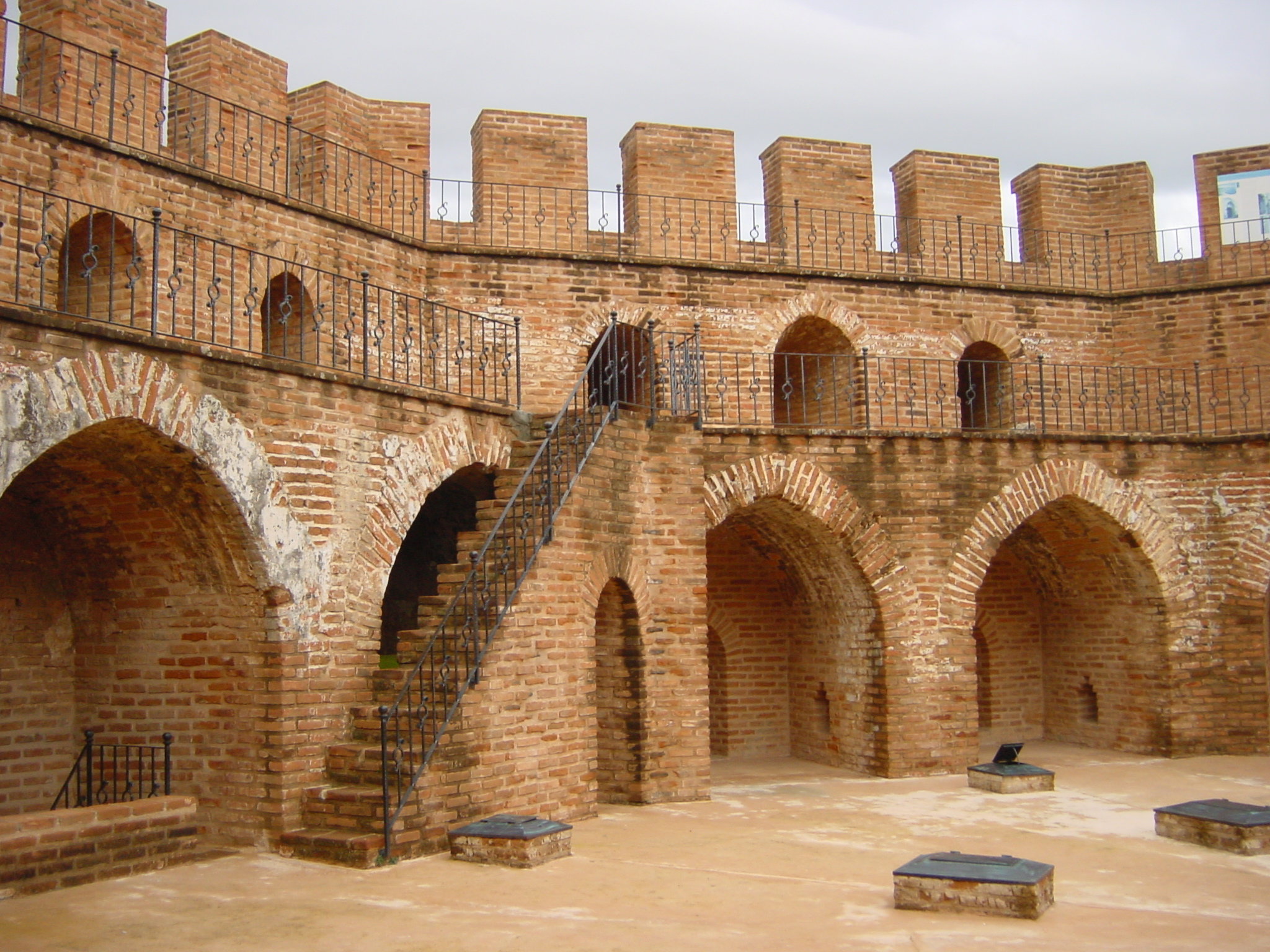 2003-12-28 01-04 T�rkei 193 Alanya, Roter Turm